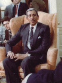 Qais Bin Abdul Munim Al Zawawi